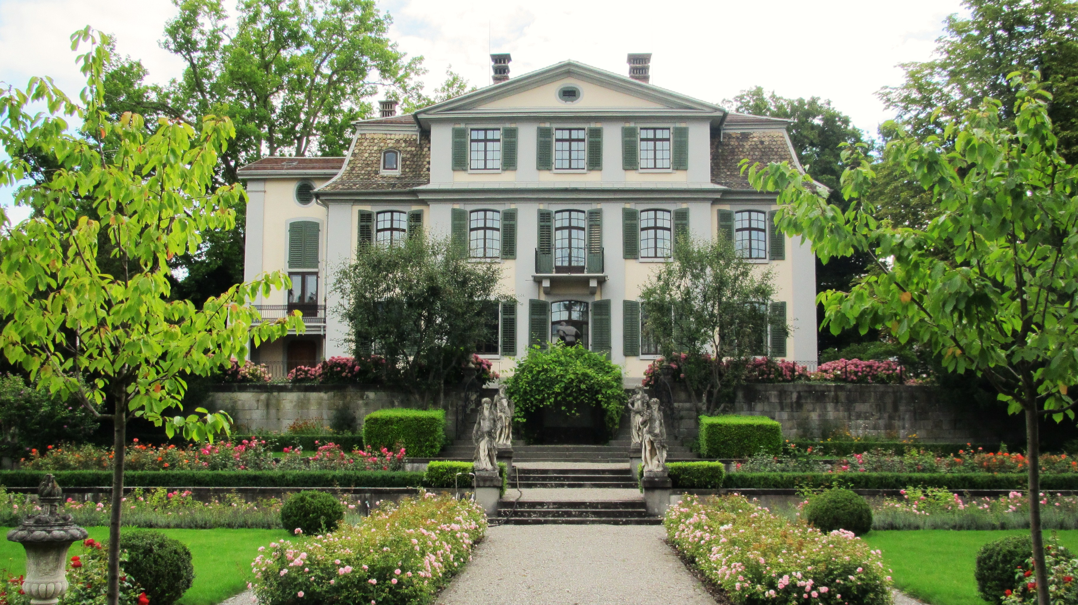 Zürich, Freigut, Brandschenkestrasse 48